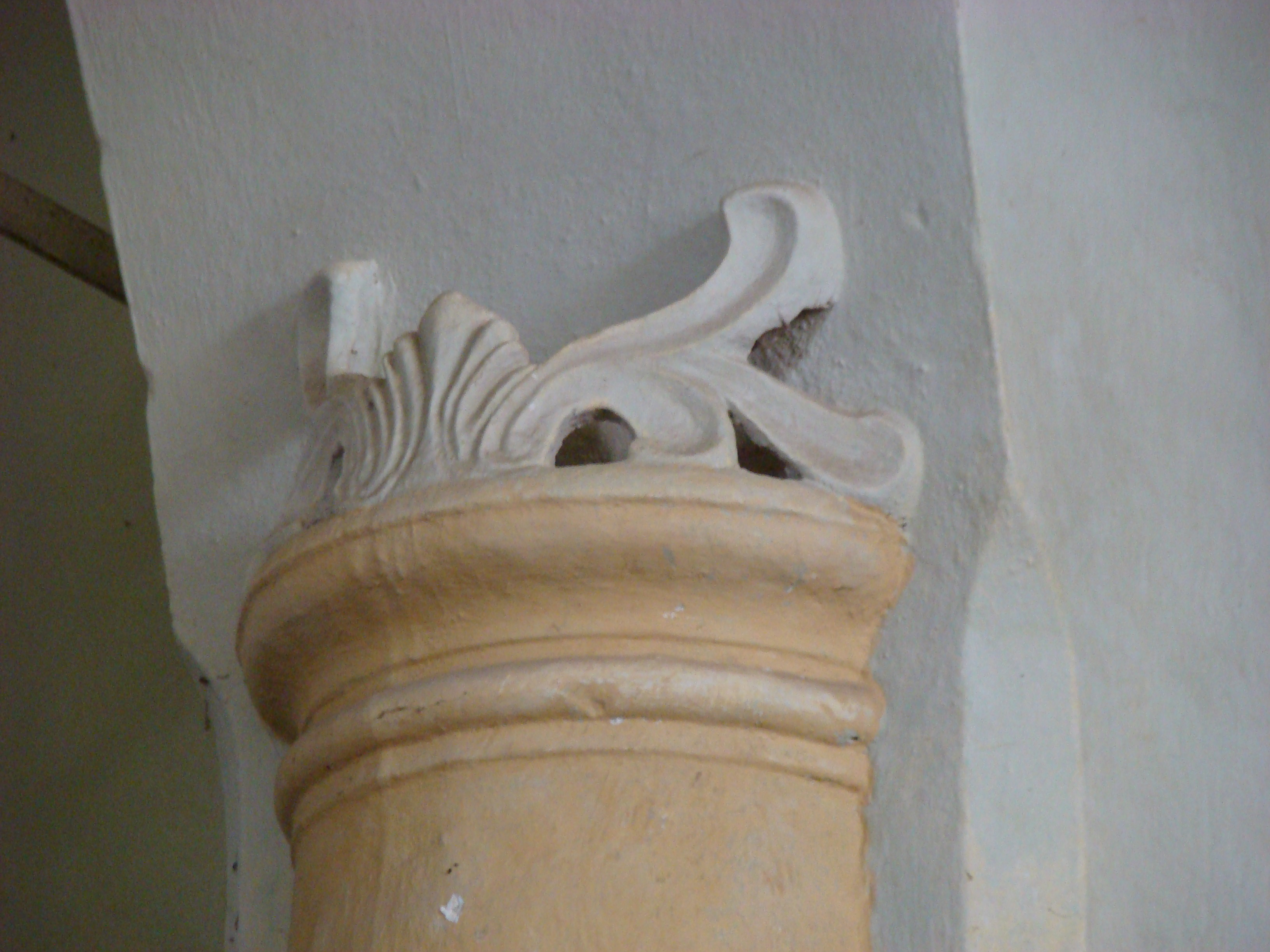 Biserica fortificată din Velţ